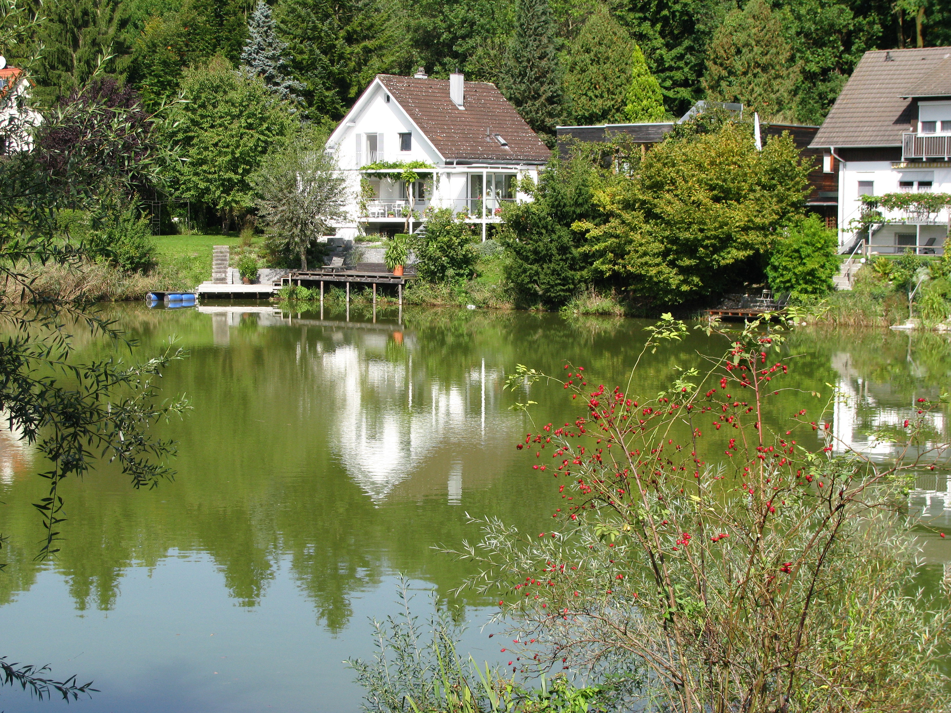 See in der Auensiedlung